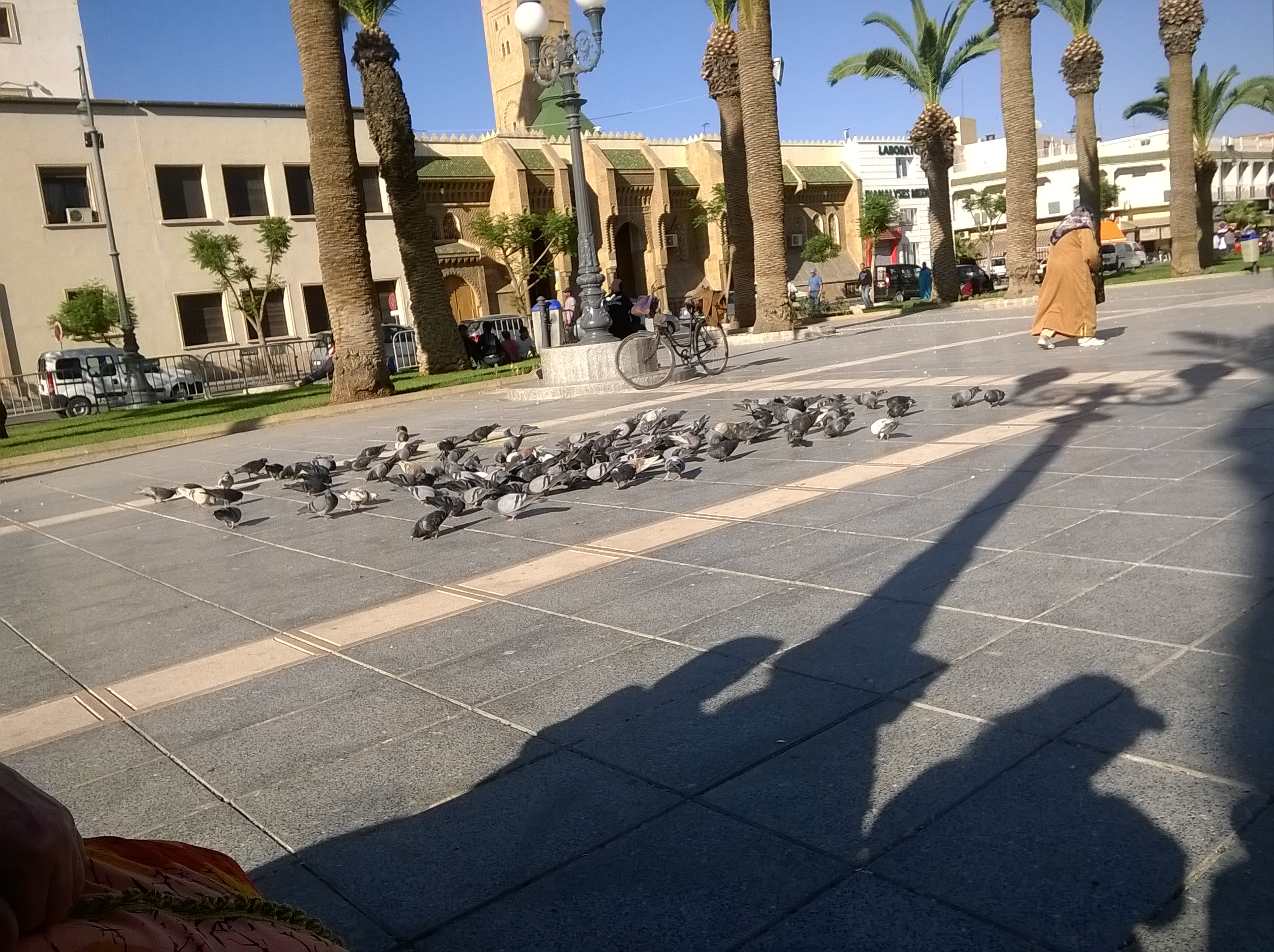 أضف وصفاأ